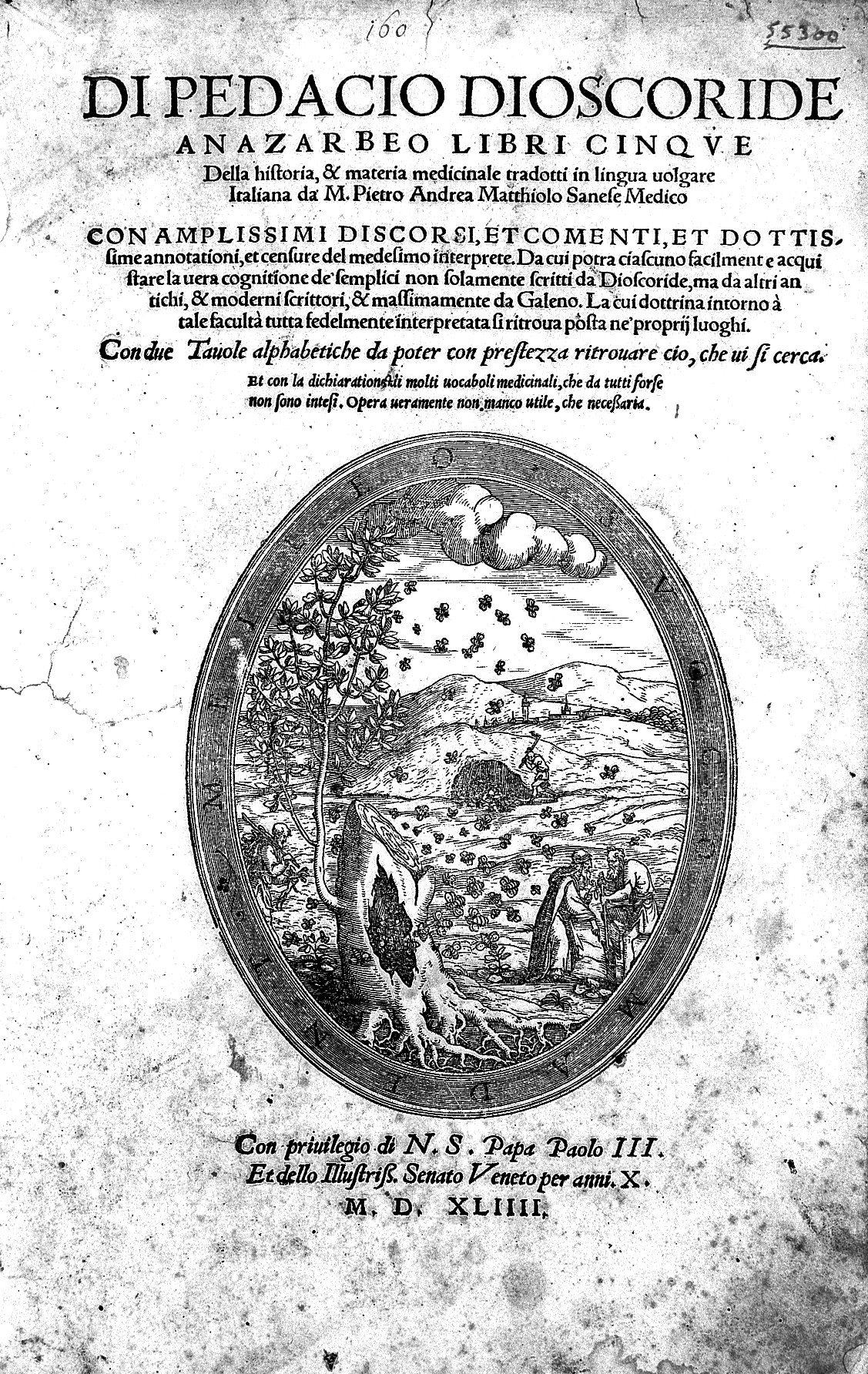 Title page -Libri cinque della historia... Rare Books Keywords: Pietro Andrea Mattioli